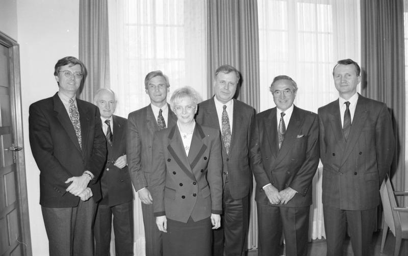 Bonn, 24.4.1991 Die Bundesministerin für Gesundheit, Gerda Hasselfeldt, empfing den Vorstand des Bundesverbandes der Pharmazeutischen Industrie e.V., Herrn Dr. von Loeper, Herrn Dr. Hartl und Herrn Dr. Thorlef-Spickschen zu einem Gespräch im Bundesgesundheitsministerium. Im Bild: (von links) Ministerialdirigent Gerhard Schulte, Dr. Wilhelm Braun, Leiter des Bonner Büros des Bundesverbandes der Pharmazeutischen Industrie (BPI), Dr. Thorlef Spüickschen, BPI-Vorstandsmitglied und Sprecher der Geschäftsführung der Boehringer Mannheim GmbH, Ministerin Gerda Hasselfeldt, Dr. Hubertus von Loeper, Vorsitzender des BPI und Vice-President Europe der Janssen Group, Dr. Fritz Hartl, BPI-Vorstandsmitglied und Geschäftsführer der Zyma Gmbh, Dr. Ulrich Vorderwülbecke, Geschäftsführer im BPI.